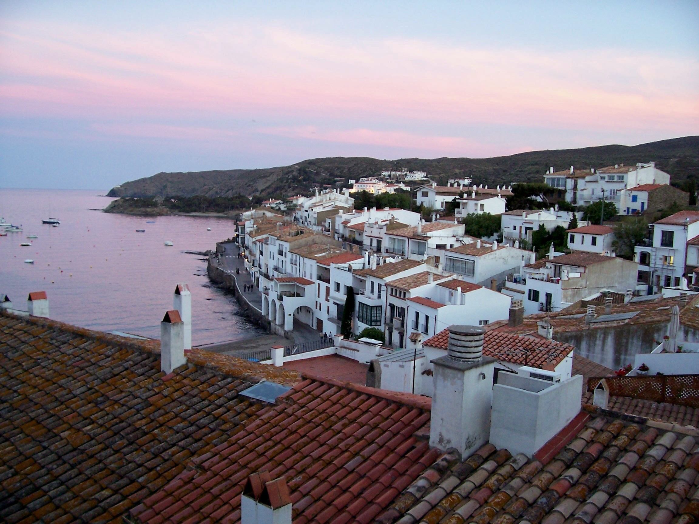 Cadaqués, la Riba Pitxot, des de l'Esglèsia de Santa Maria